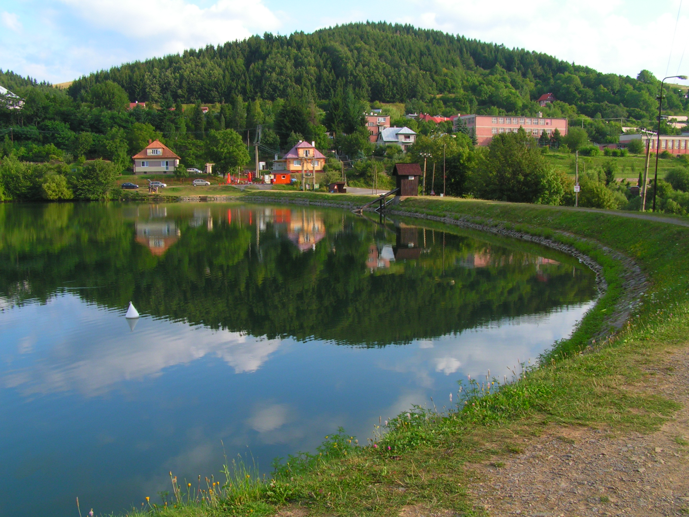 Vinšachtský tajch naplnený po rekonštrukcii